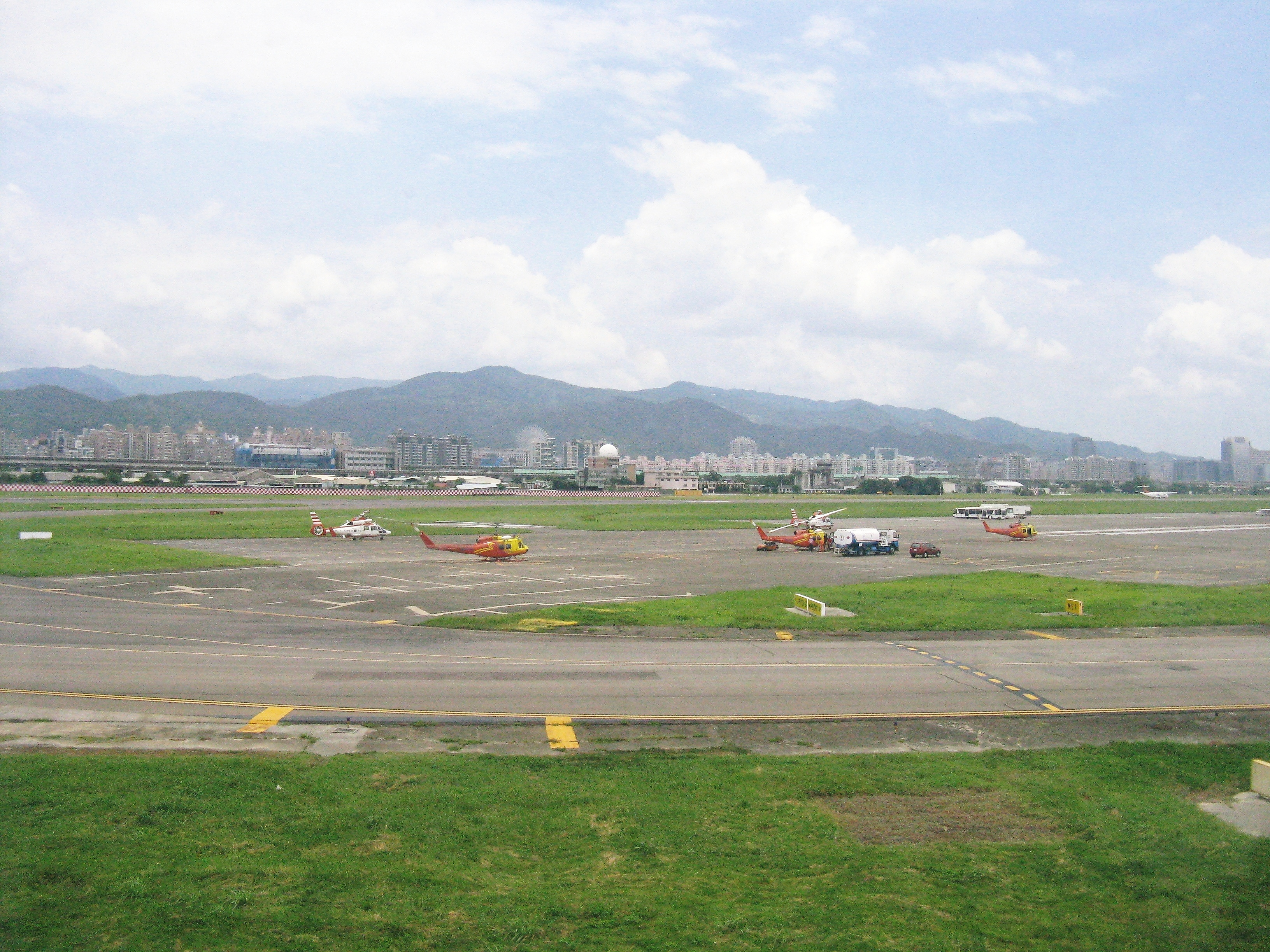 台北松山空港滑走路西端のヘリコプター駐機エプロン。